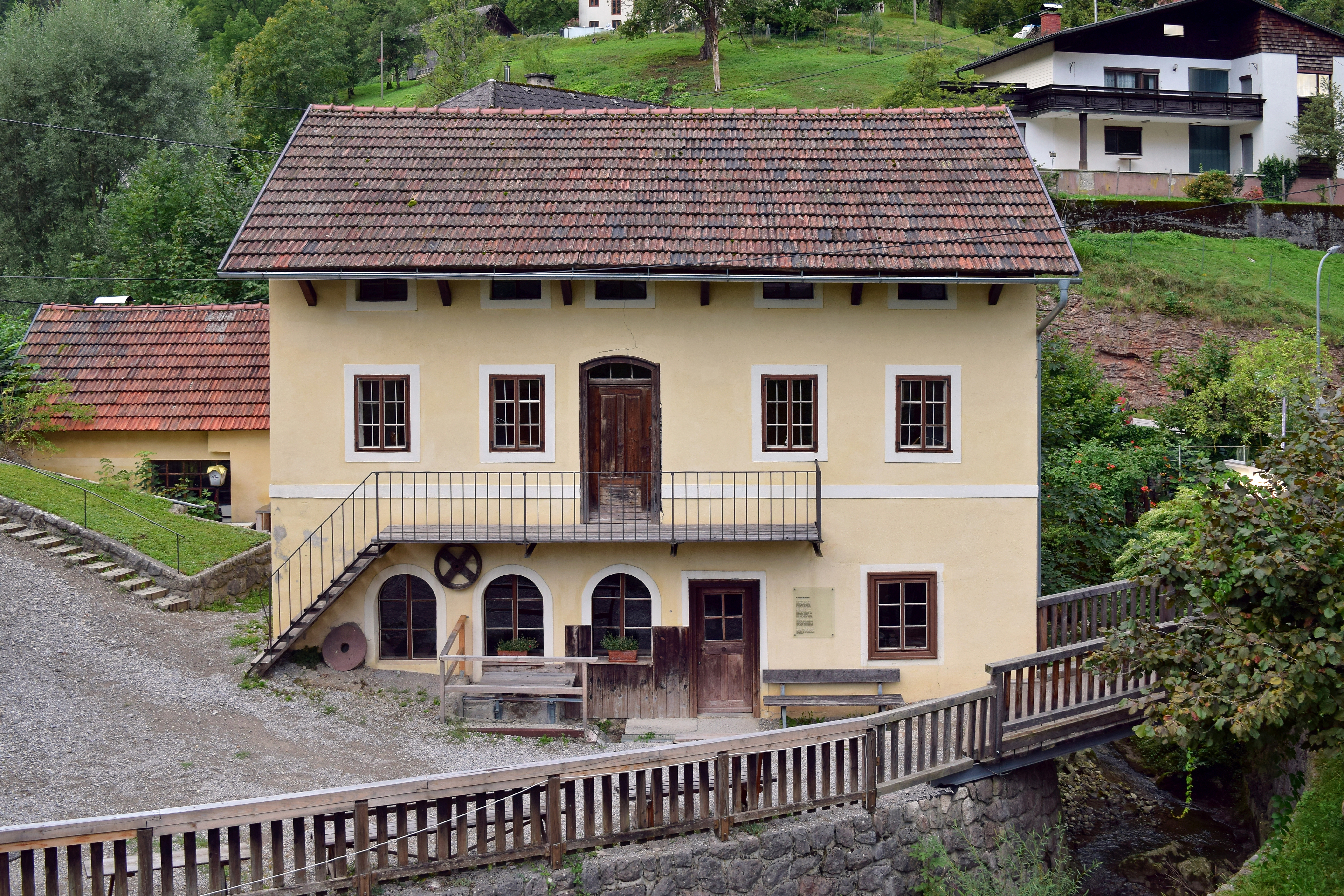 Messerproduktionsstätte (Drechslerei, Schmiede, Lagergebäude)